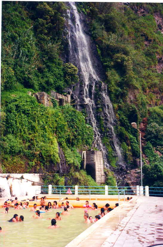 Les thermes publics à Baños (Equateur)